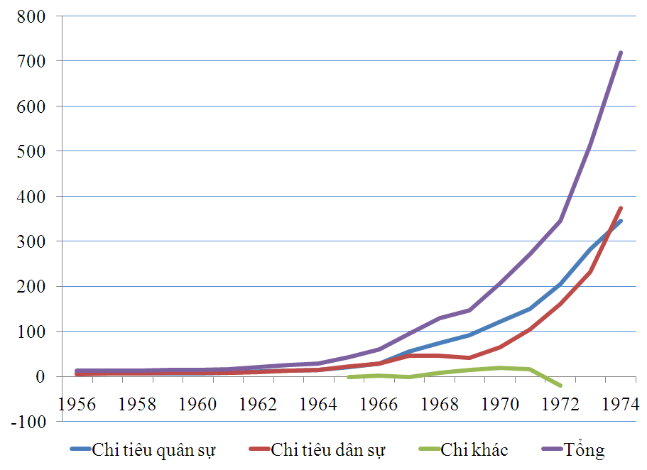 Chi ngân sách chính phủ (đơn vị: tỷ đồng) của Việt Nam Cộng hòa thời kỳ 1956-1974. Dựa theo số liệu của Dacy (1986), Foreign aid, war, and economic development: South Vietnam, 1955-1975, Cambridge University Press, bảng 11.1.